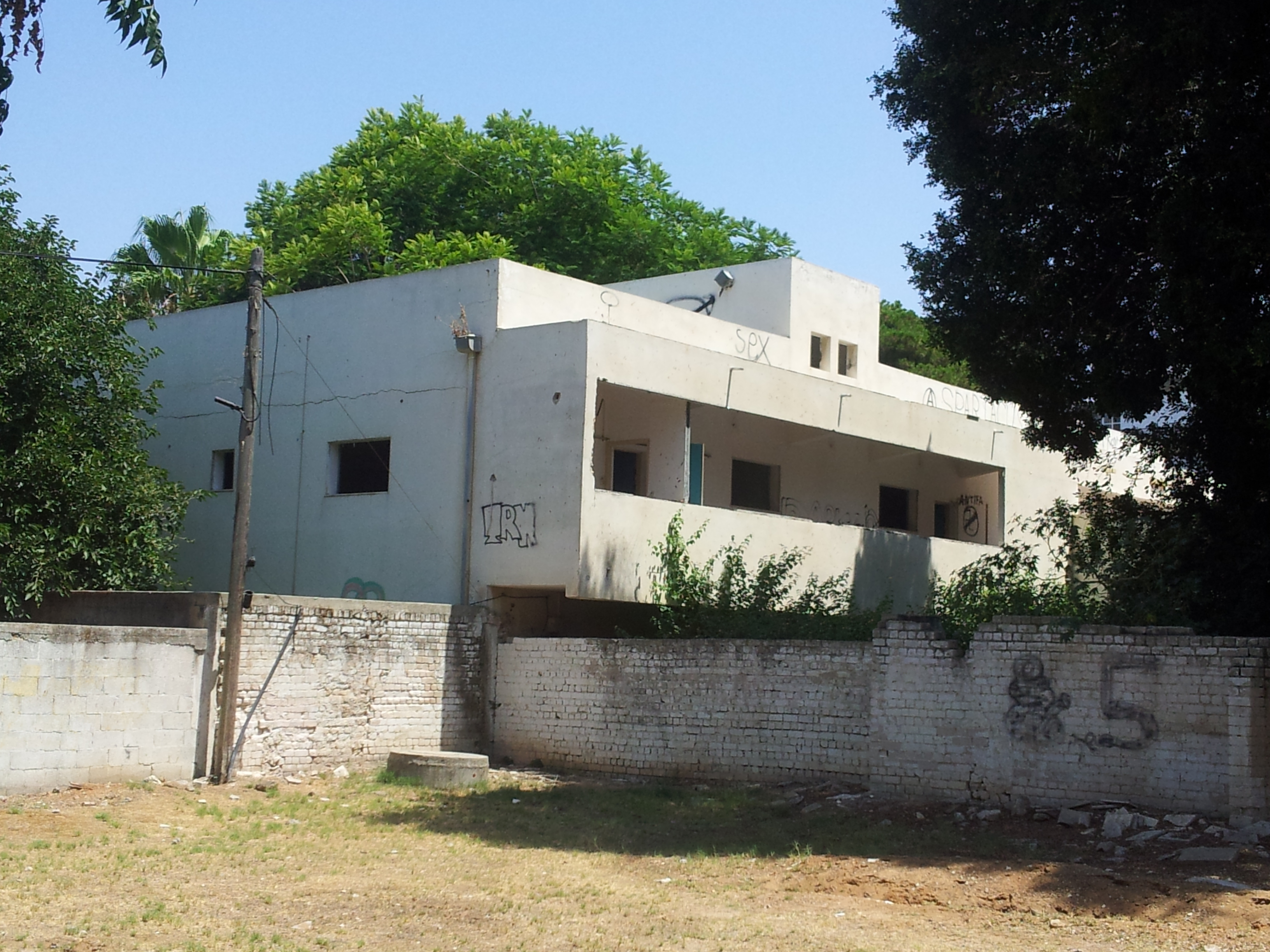 מבט מצפון מחנה ראובן, בת ים.